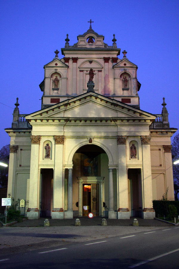 Vista serale del Santuario del Varallino a Galliate (NO)